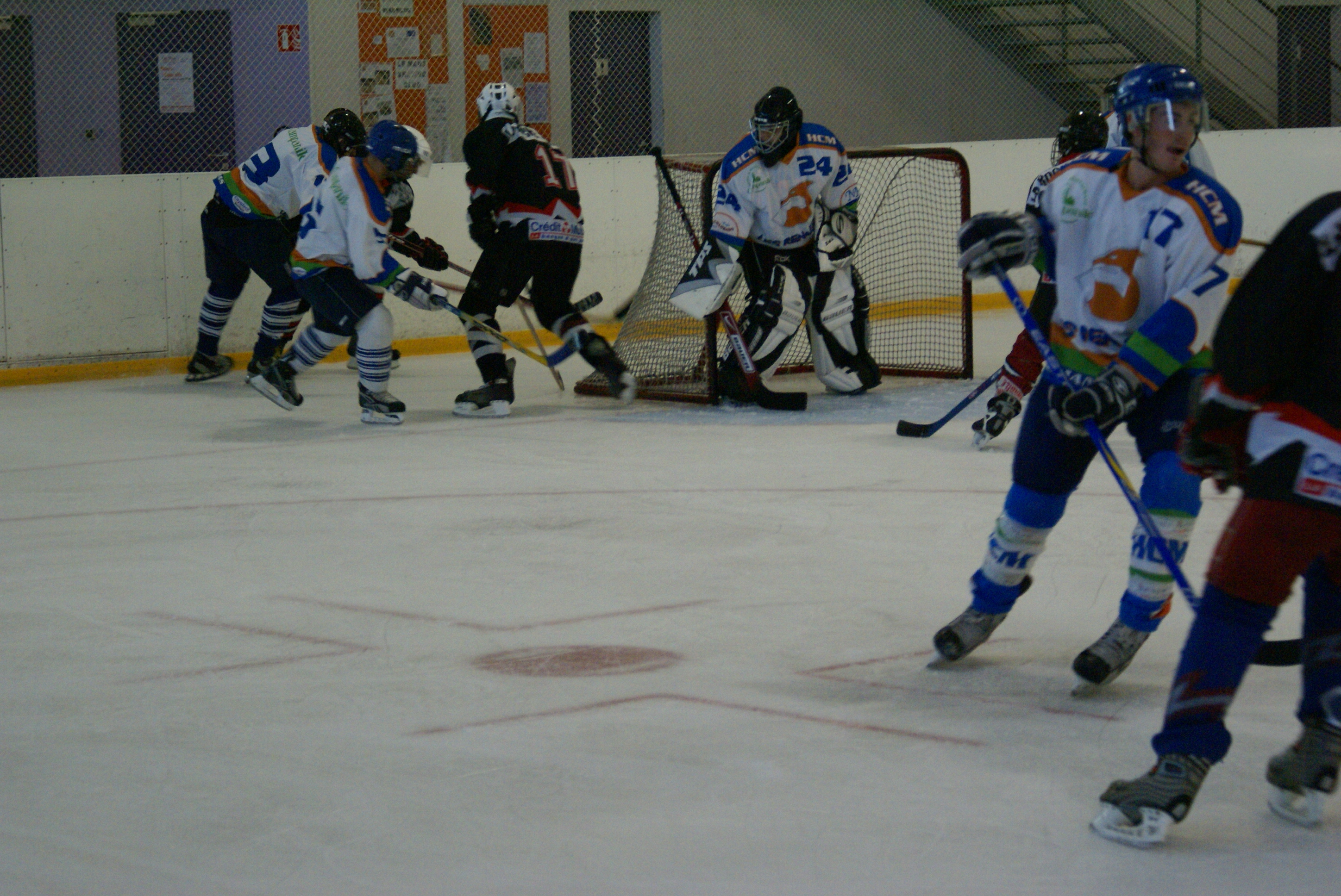 photo prise lors du match de hockey sur glace le mans orleans